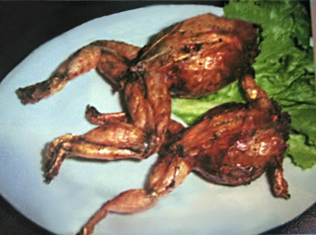 Stuffed Frogs Cambodia Hannah Steinacker, self made